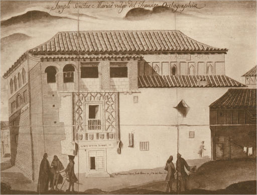 Dibujo de la sinagoga del Transito del siglo XVIII